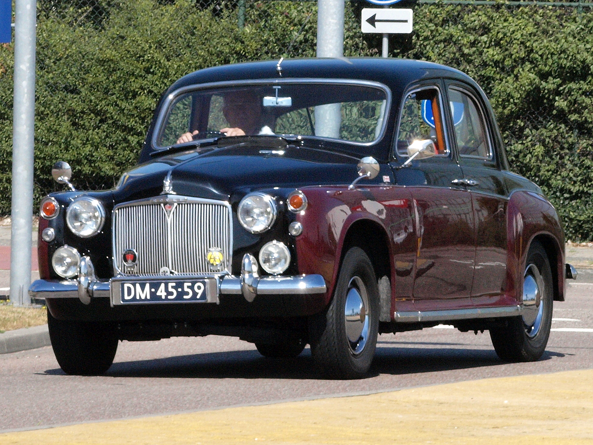 Rover P4 DM-45-59